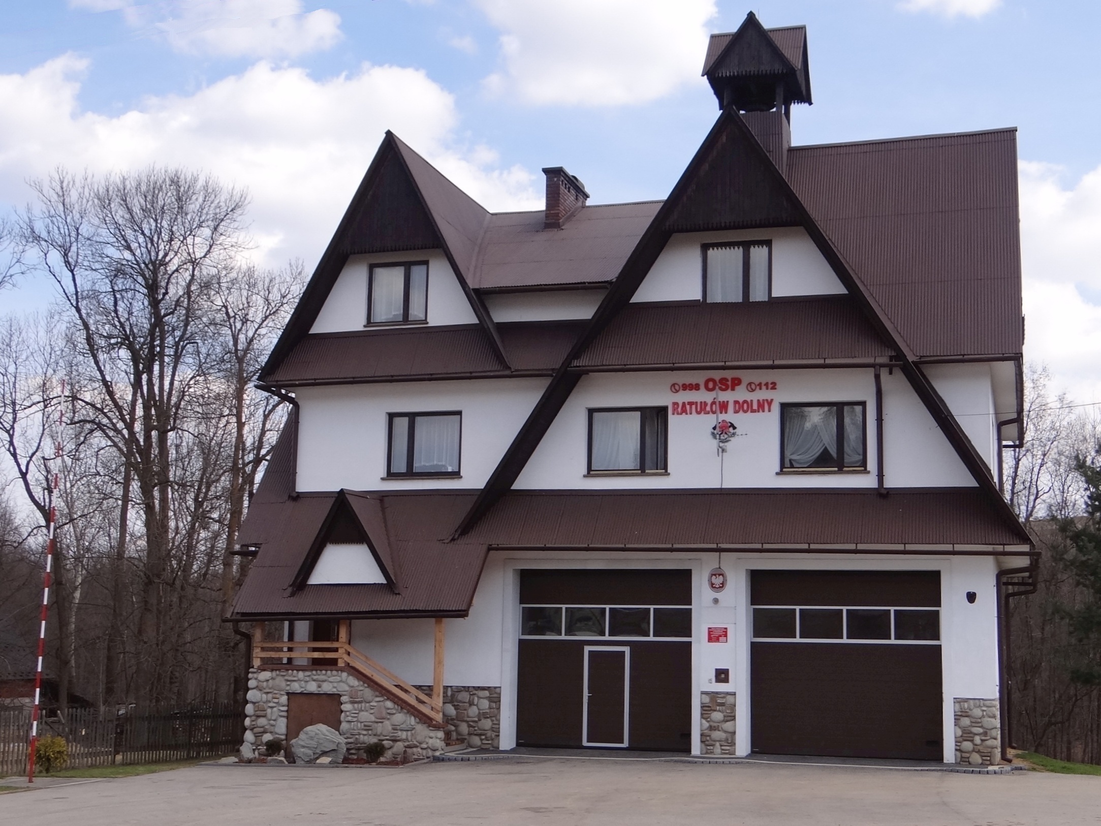 Ratułów. Remiza OSP w Ratułowie Dolnym